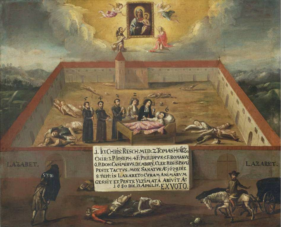 Das Pestlazarett in Wien – Alsergrund - Votivbild, um 1680 Wien, St. Michael